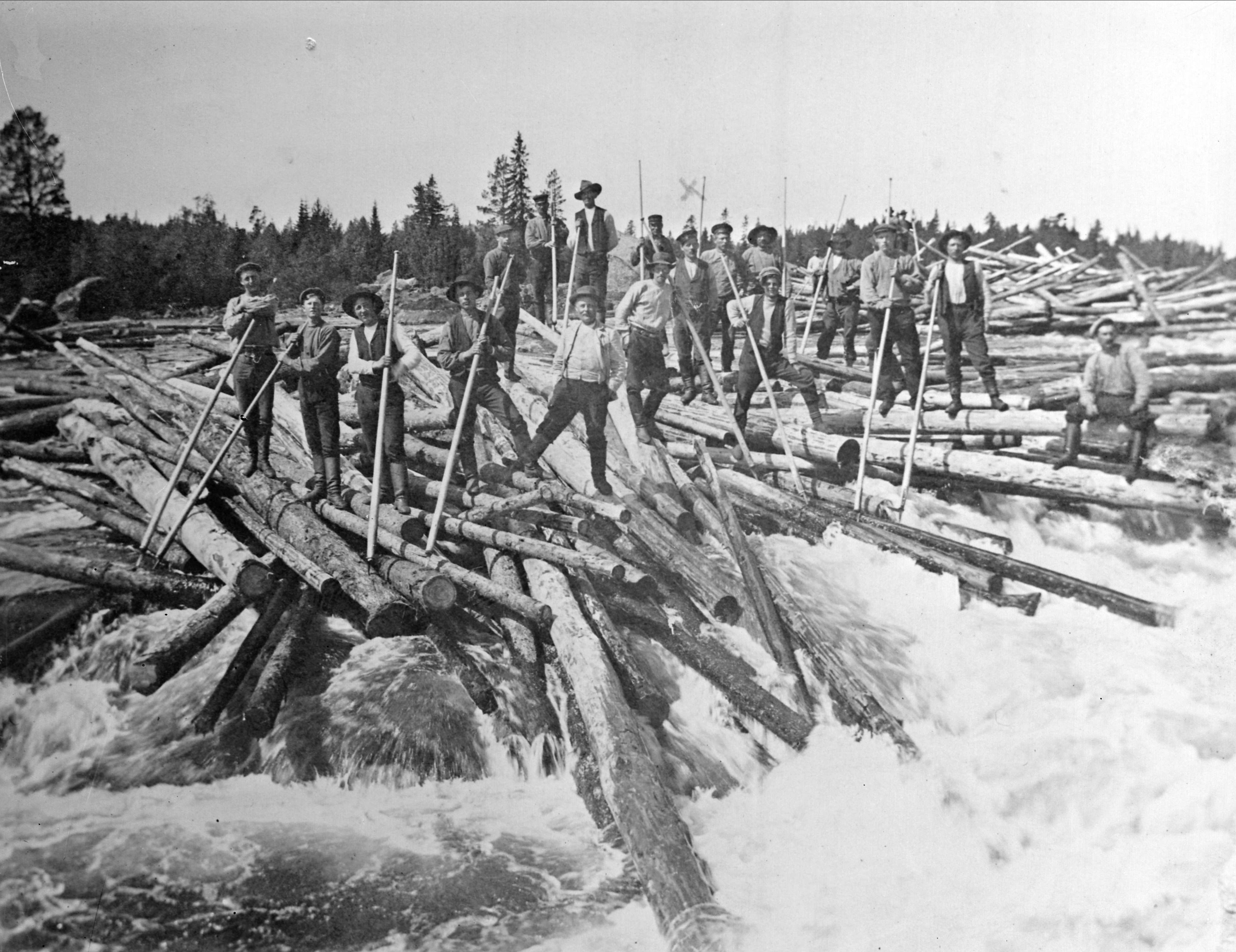 Timmerflottare, Haverö socken, Medelpad. Slutrensning ("rumpning") av timret, som fastnat på stenar då vattenståndet sjunkit.